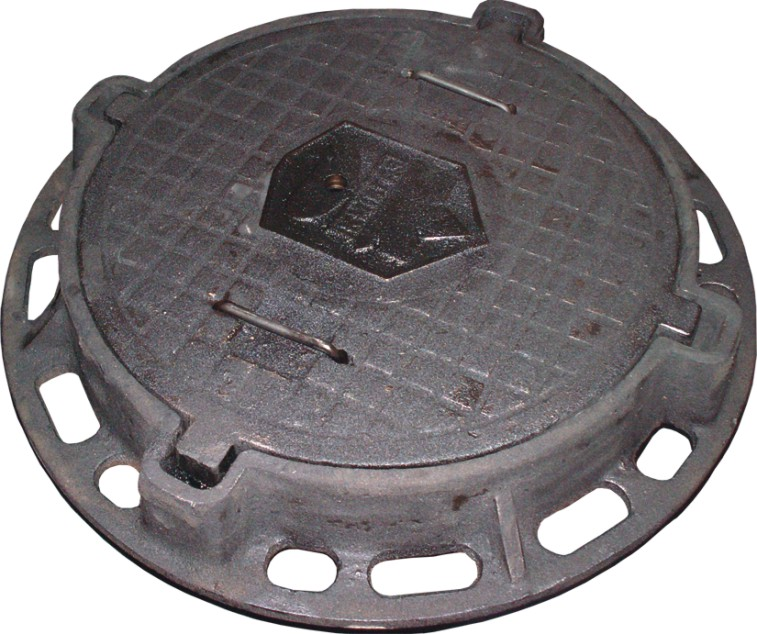 Люк каналізаційний газовий типу "ДУ-500"